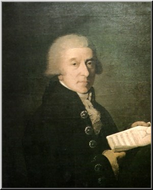 Portrait du compositeur italien Giuseppe Sarti (1729-1802) Giuseppe Sarti peint par Salvatore Tonci, probablement lors de son séjour ą Saint-Petersbourg, vers 1798. ( coll. privée ) DR.